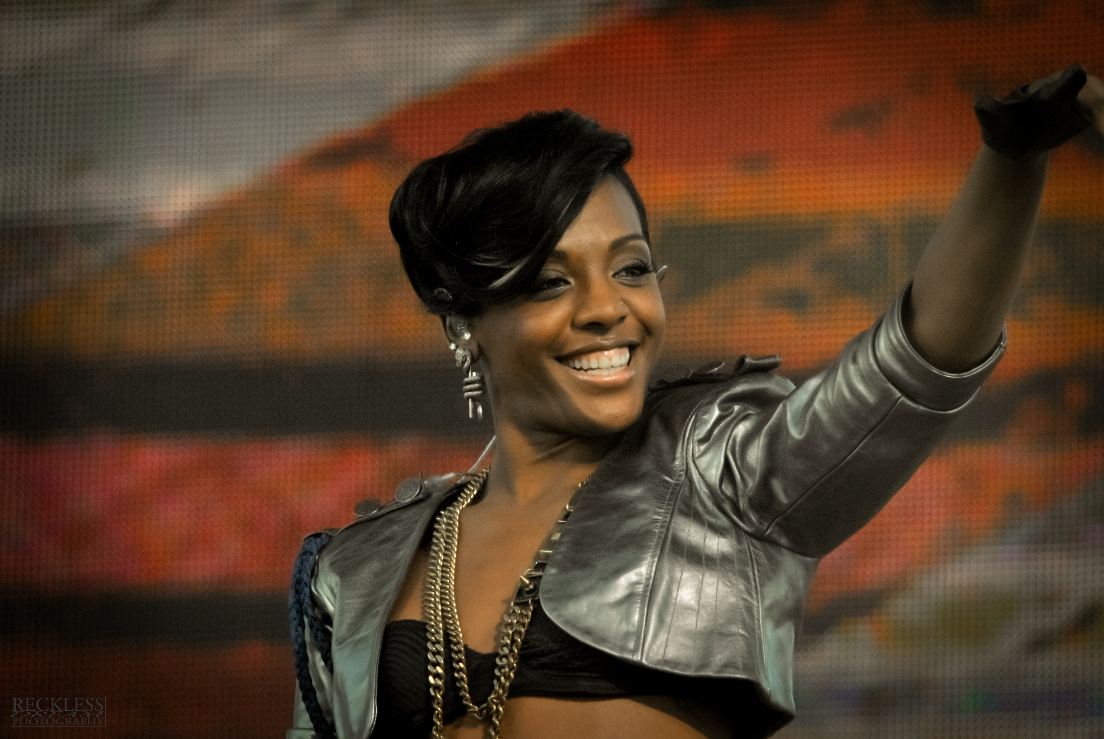 Dawn 17